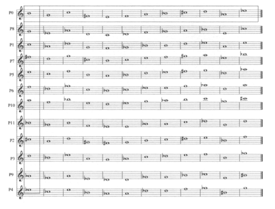 ordre de transposicions